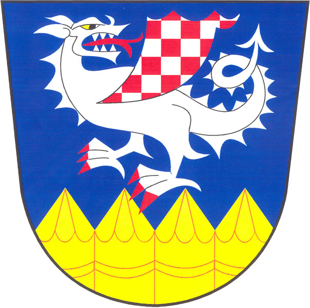 Znak obce Chudeřice